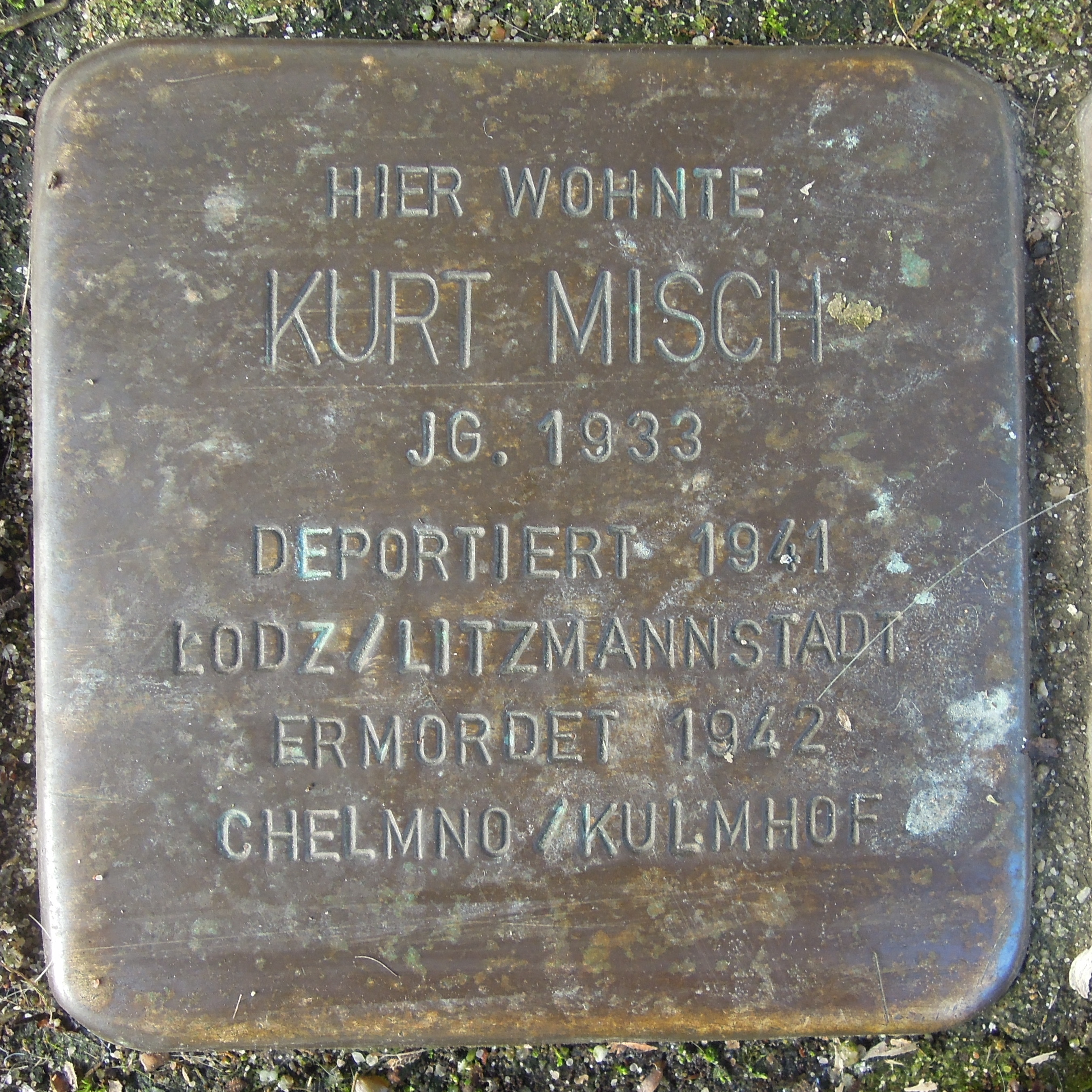 Stolperstein Alpen Burgstraße 17 Kurt Misch